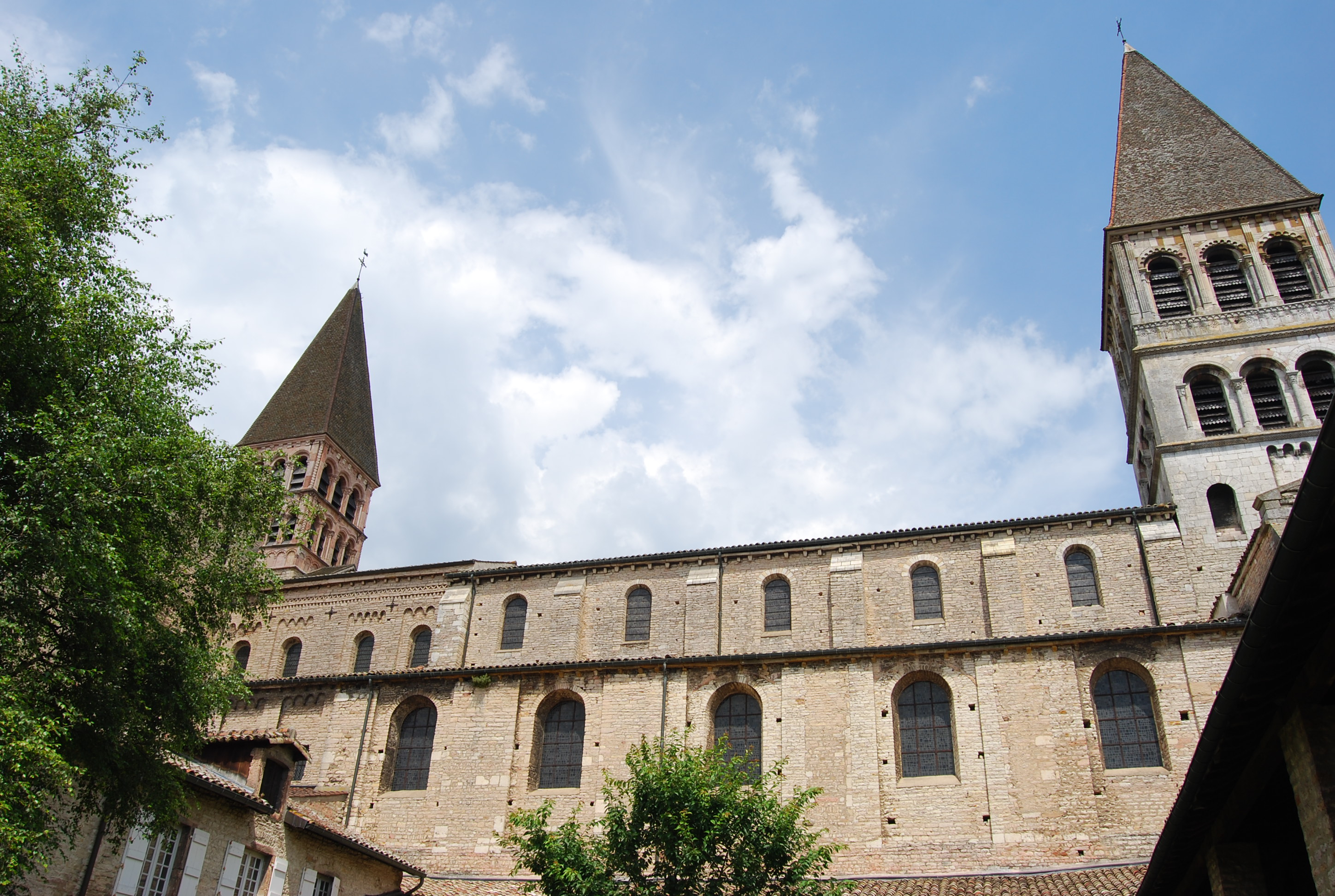 Lato nord